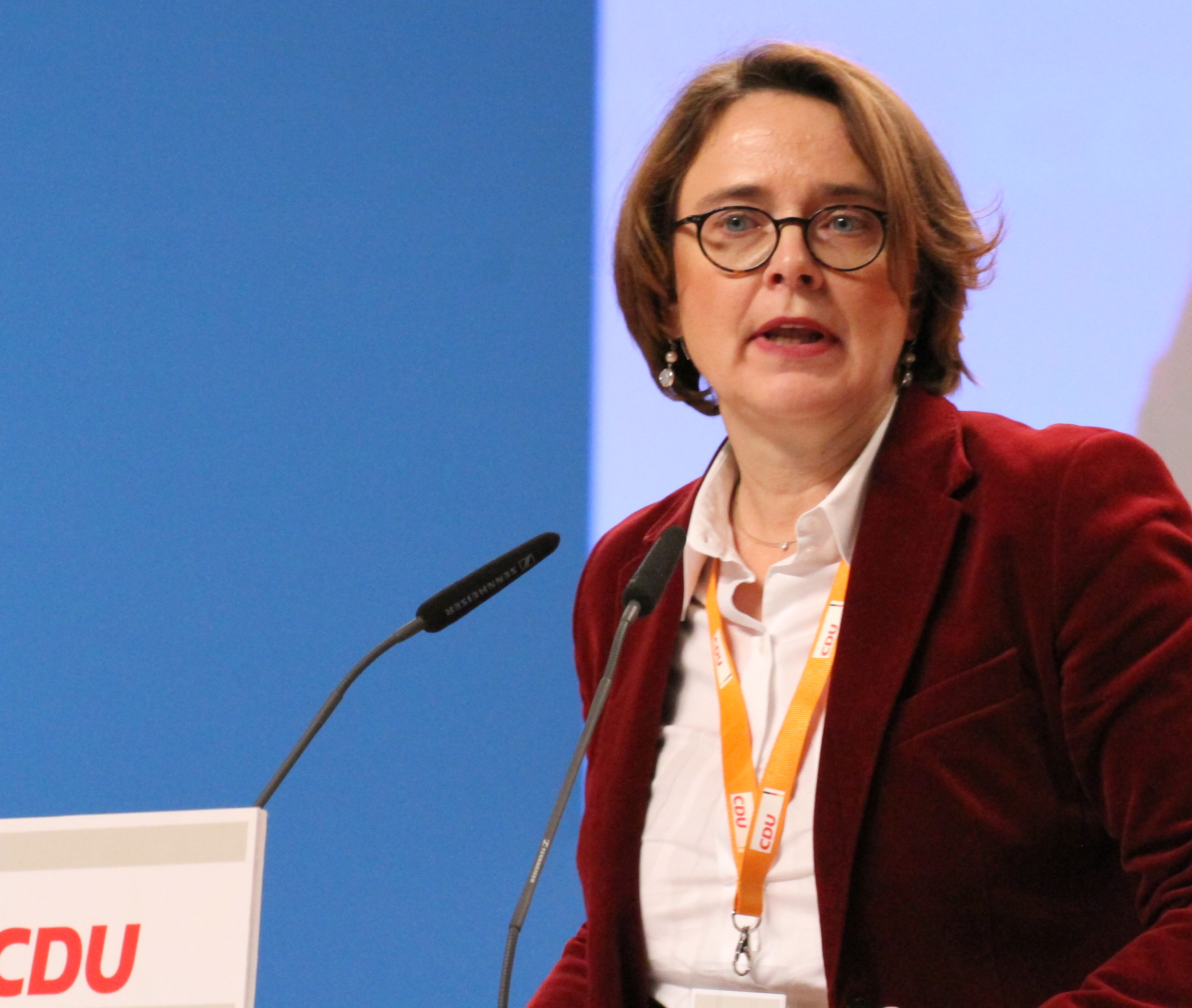 Annette Widmann-Mauz auf dem CDU Bundesparteitag Dezember 2014 in Köln